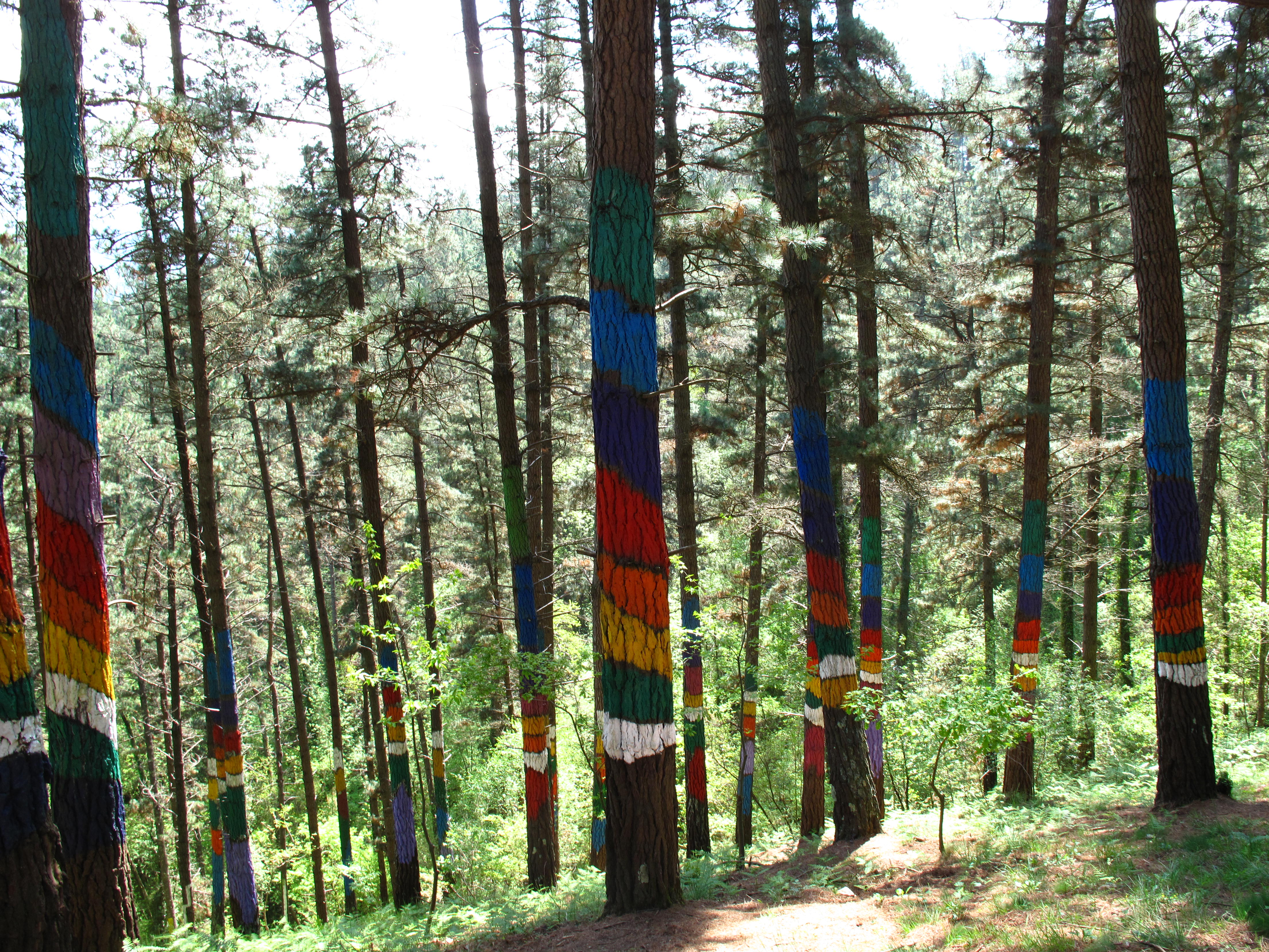 Bosque de Oma, en Kortezubi (obra de Agustín Ibarrola).